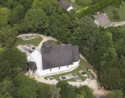 L'église Saint-Germain de La Vacherie.